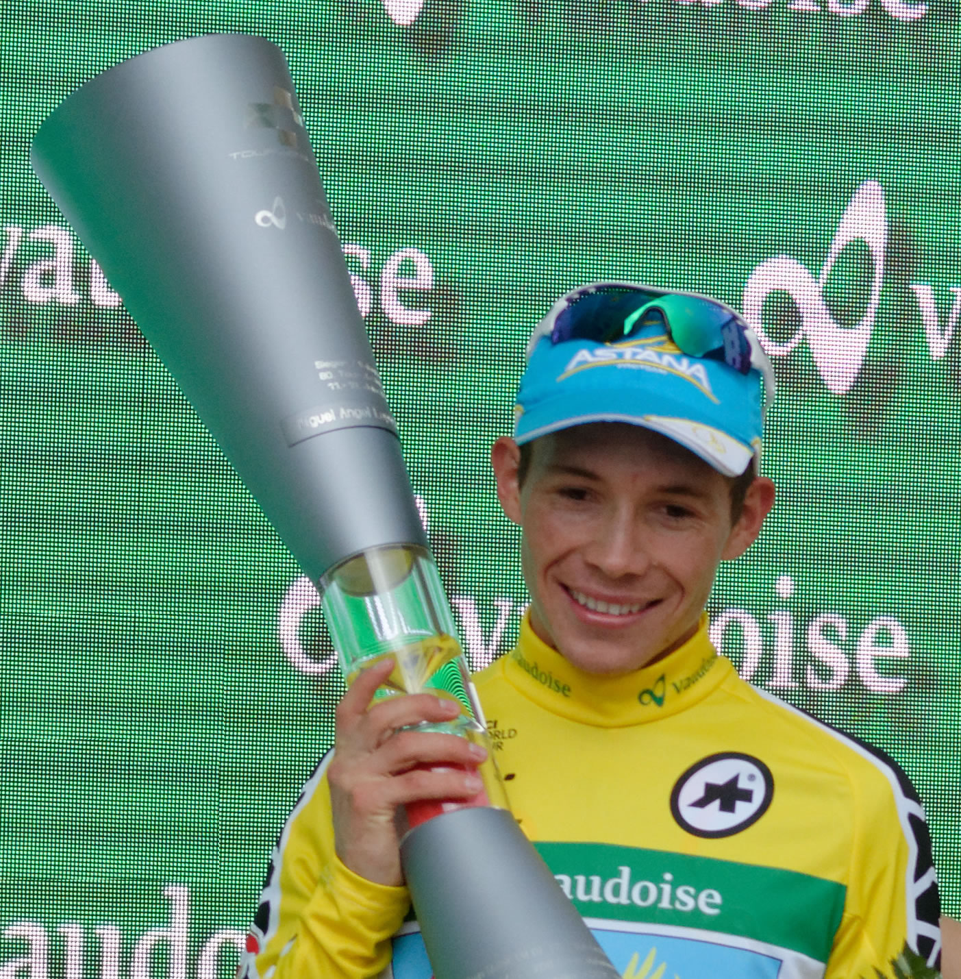 Miguel Ángel López en el podio del Tour de Suiza 2016